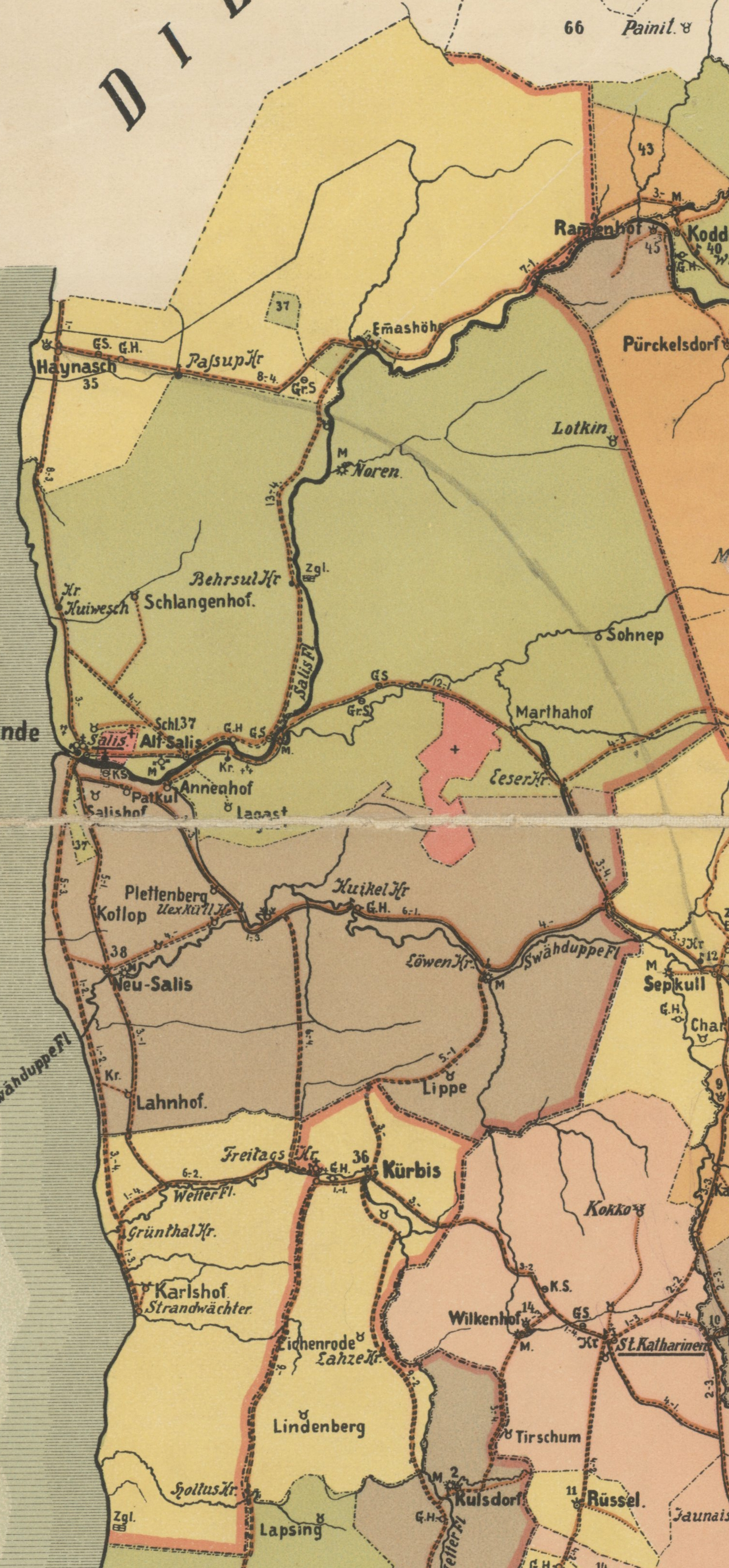 Salatsi kihelkonna mõisad 1903. aasta kaardil.